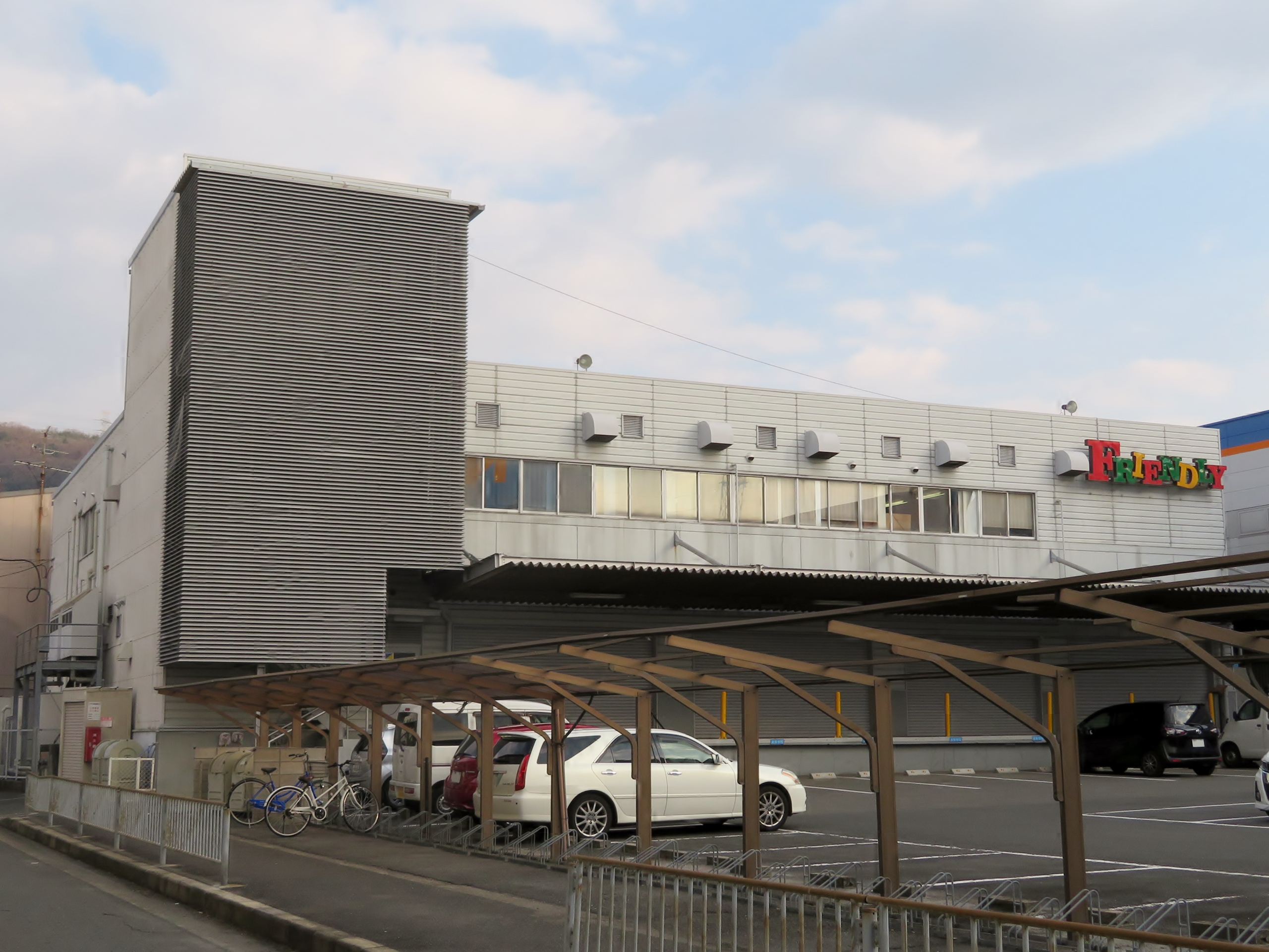 株式会社フレンドリー本社を撮影。